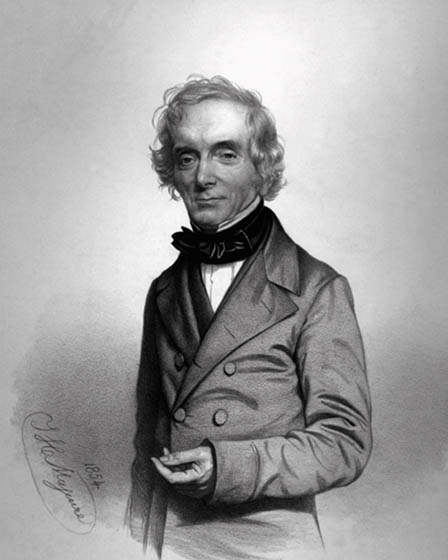 William John Burchell (1781-1863)